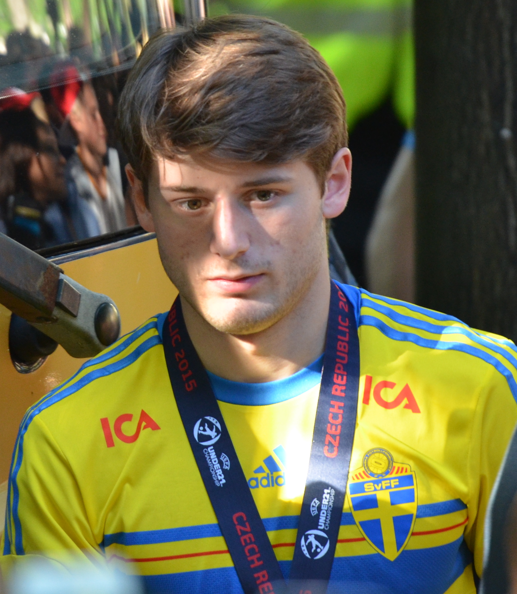 Firande av U21 EM-guldet, efter en bussresa genom Stockholm till Kungsträdgården där det var underhållning och lagpresentation avslutade spelarna med att skriva autografer och ta bilder tillsammans med fans.